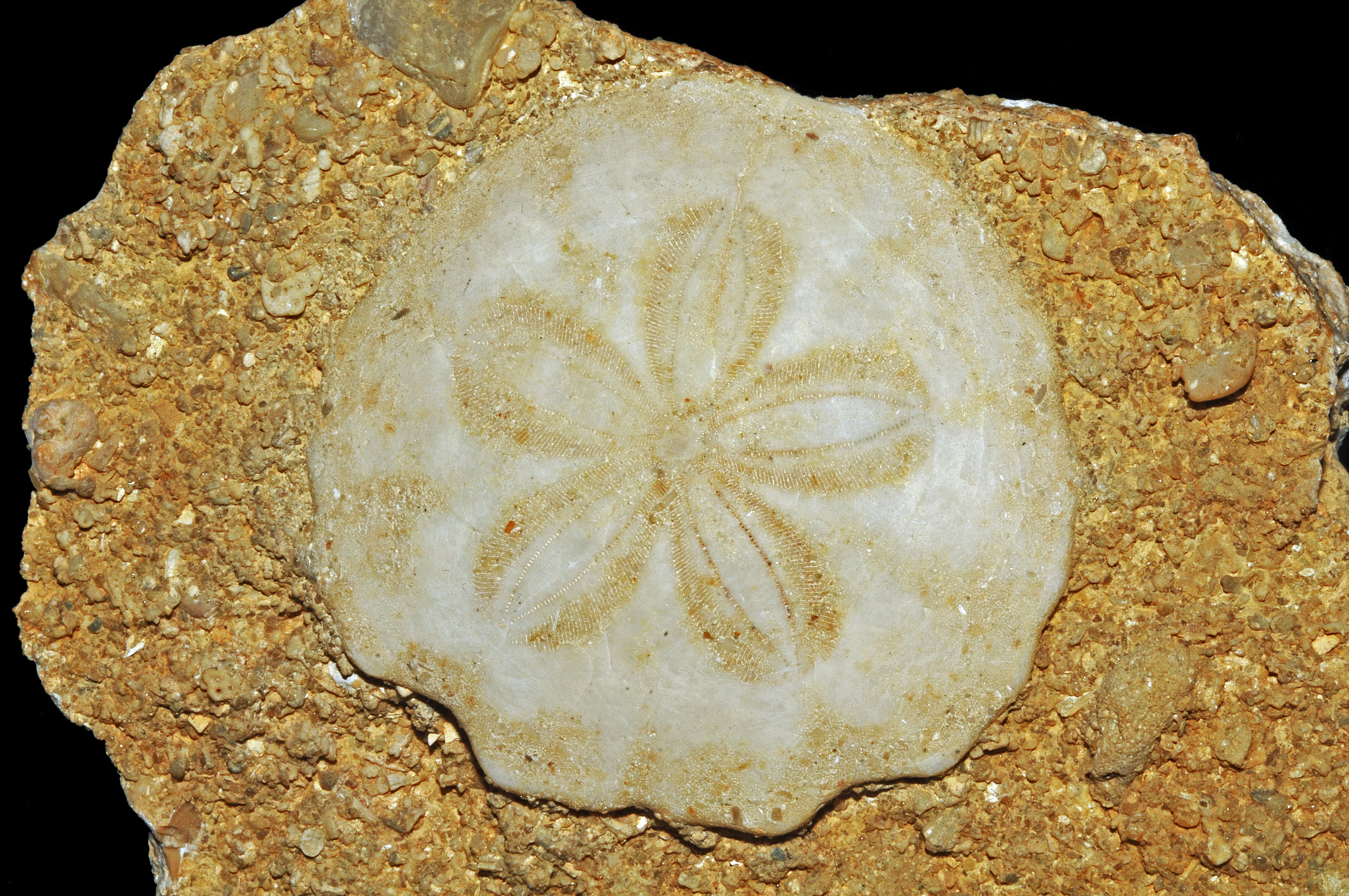 Scutella subrotunda (Leske, 1778) - Miocène - Faluns de Touraine, France